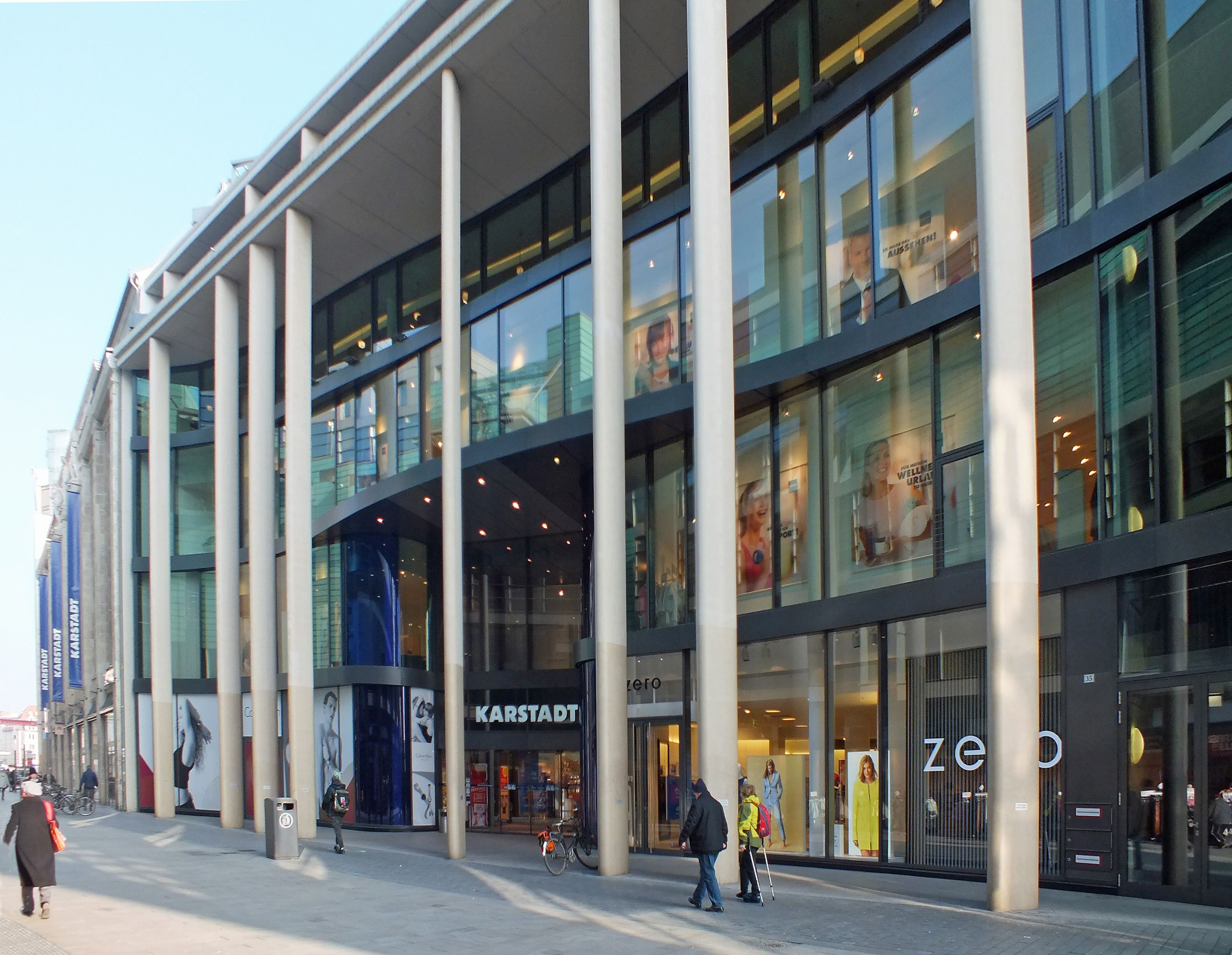 Das Kaufhaus Karstadt Leipzig, Front zur Petersstraße